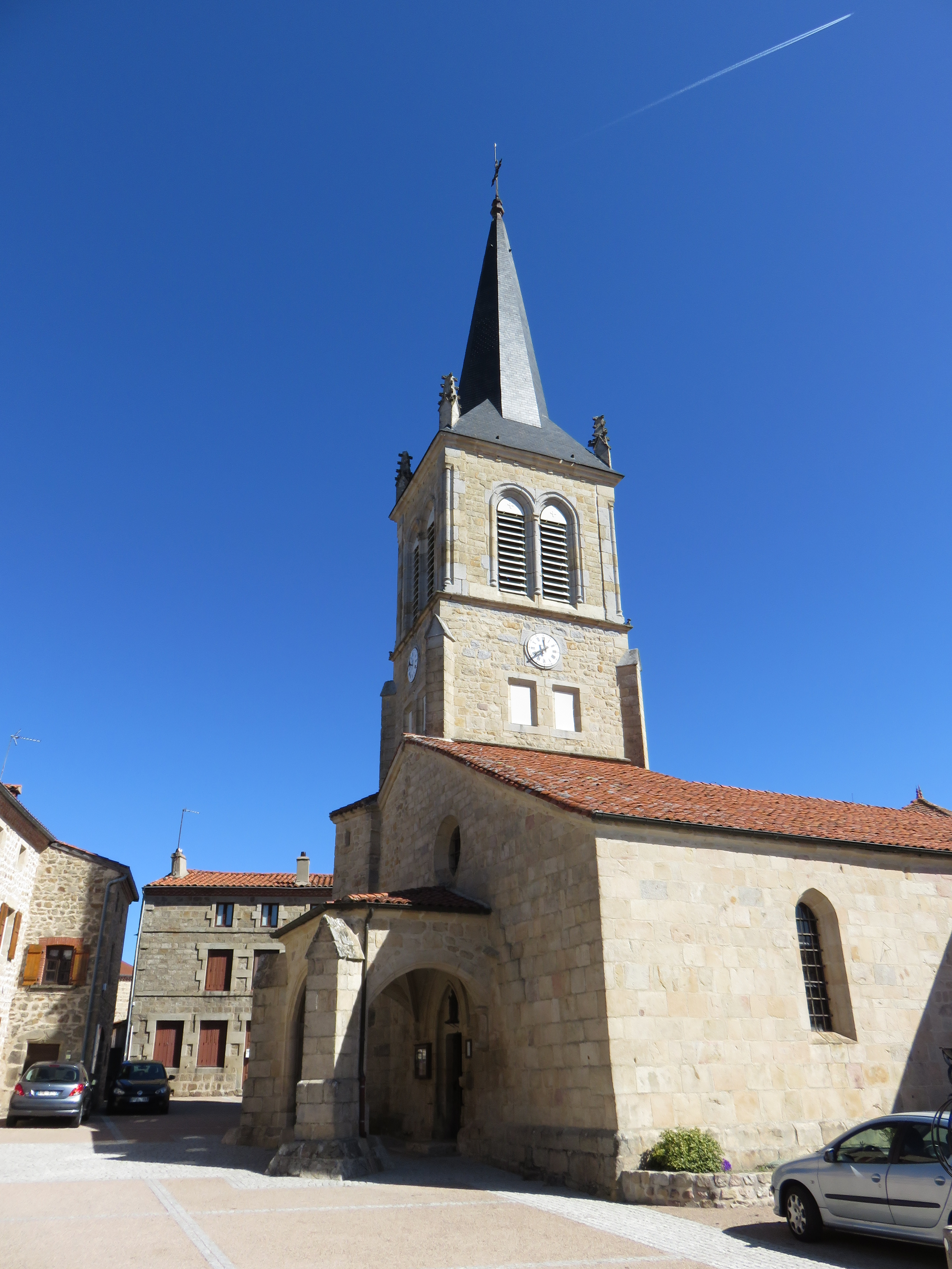 Église Saint-Hilaire de Saint-Hilaire-Cusson-la-Valmitte, dans la Loire.